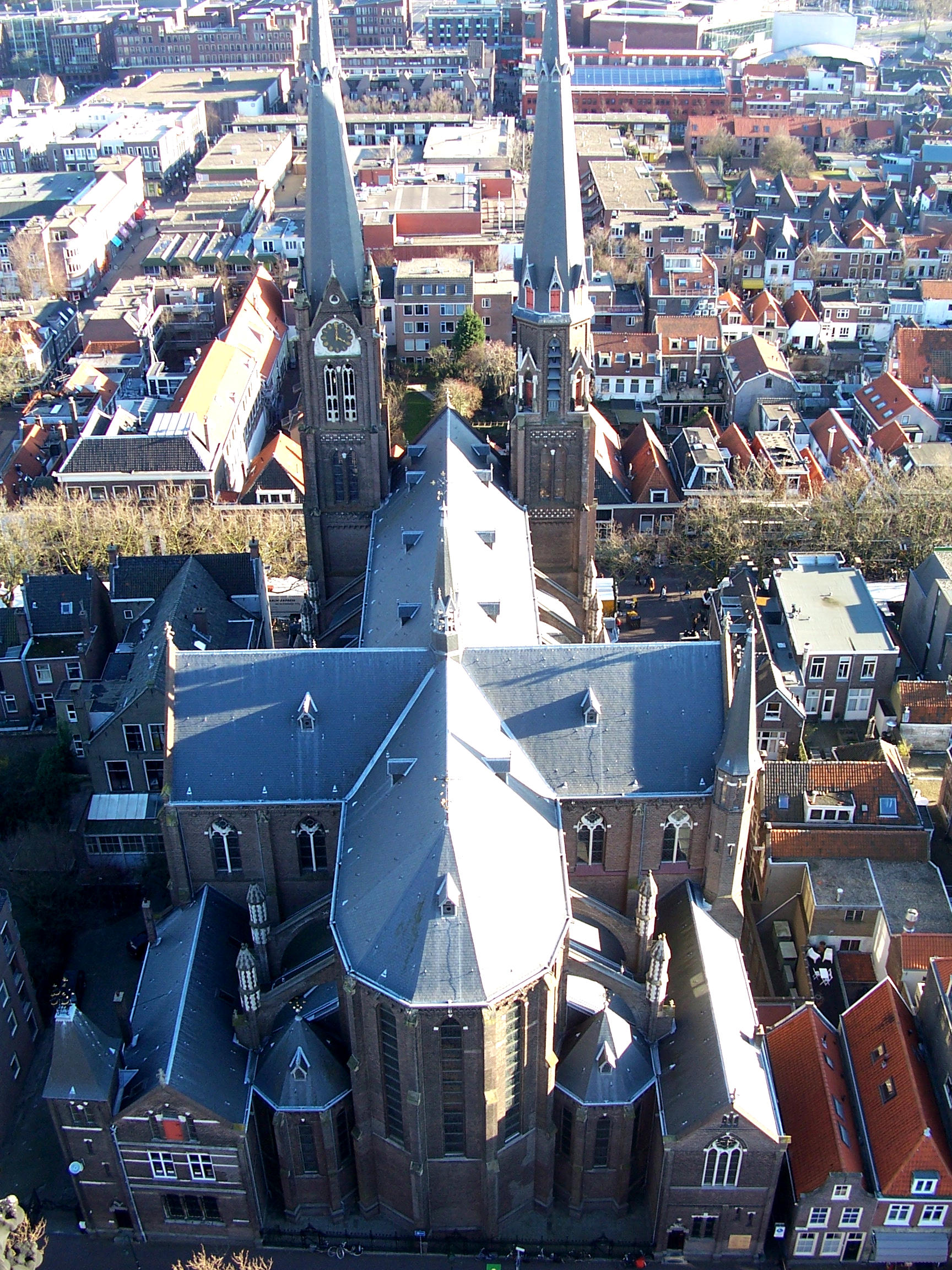 Maria van Jesse church in Delft